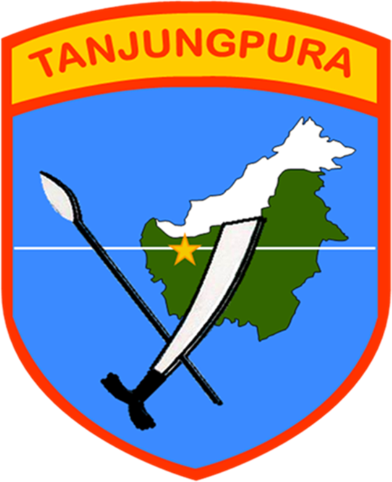 Gambar ini adalah Lambang Kodam XII Tanjungpura